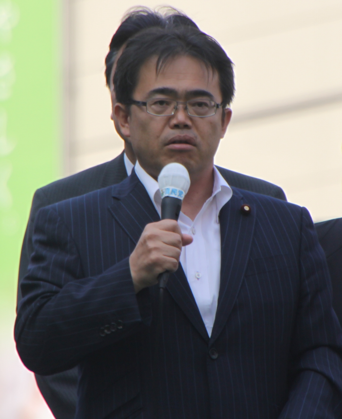 大村秀章、創生「日本」による池袋駅での演説